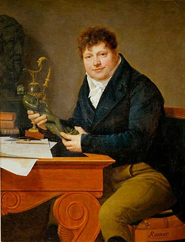 Portrait du bronzier, chansonnier et goguettier André-Antoine Ravrio (1759-1814) fait par son cousin Henri-François Riesener.